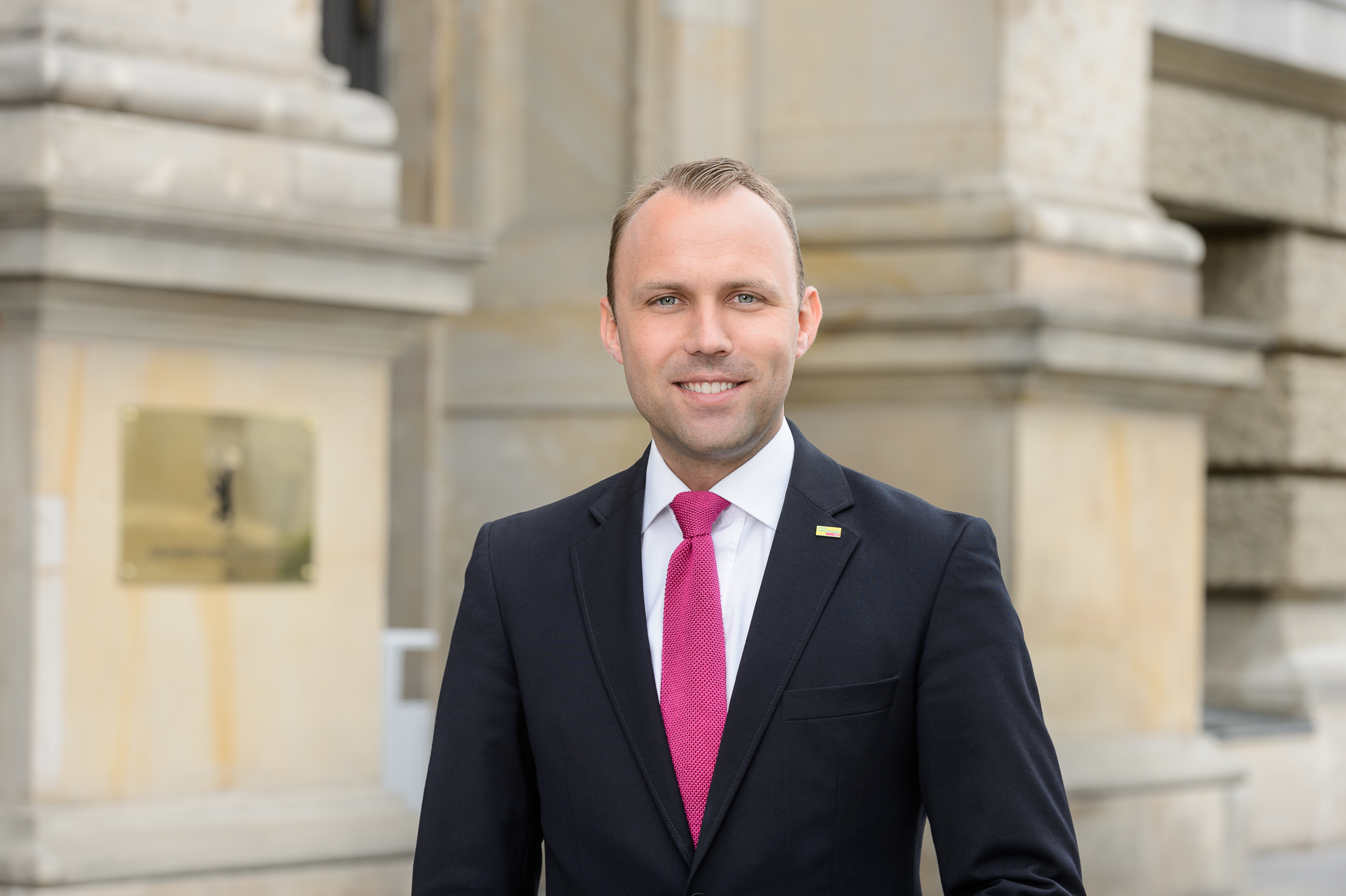 Sebastian Czaja, deutscher Politiker (FDP)